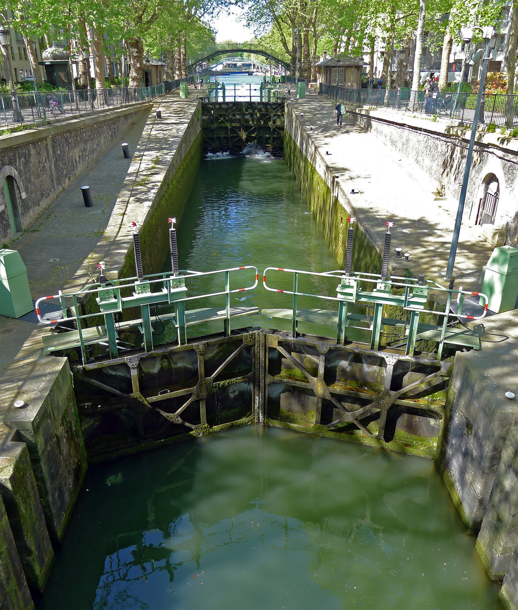 Canal Saint-Martin (écluses du temple devant la passerelle des Douanes) - Paris X